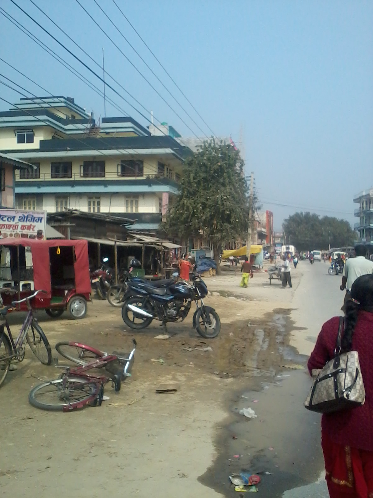 सुरुङ्गा बजार अहिलेको अवस्थामा